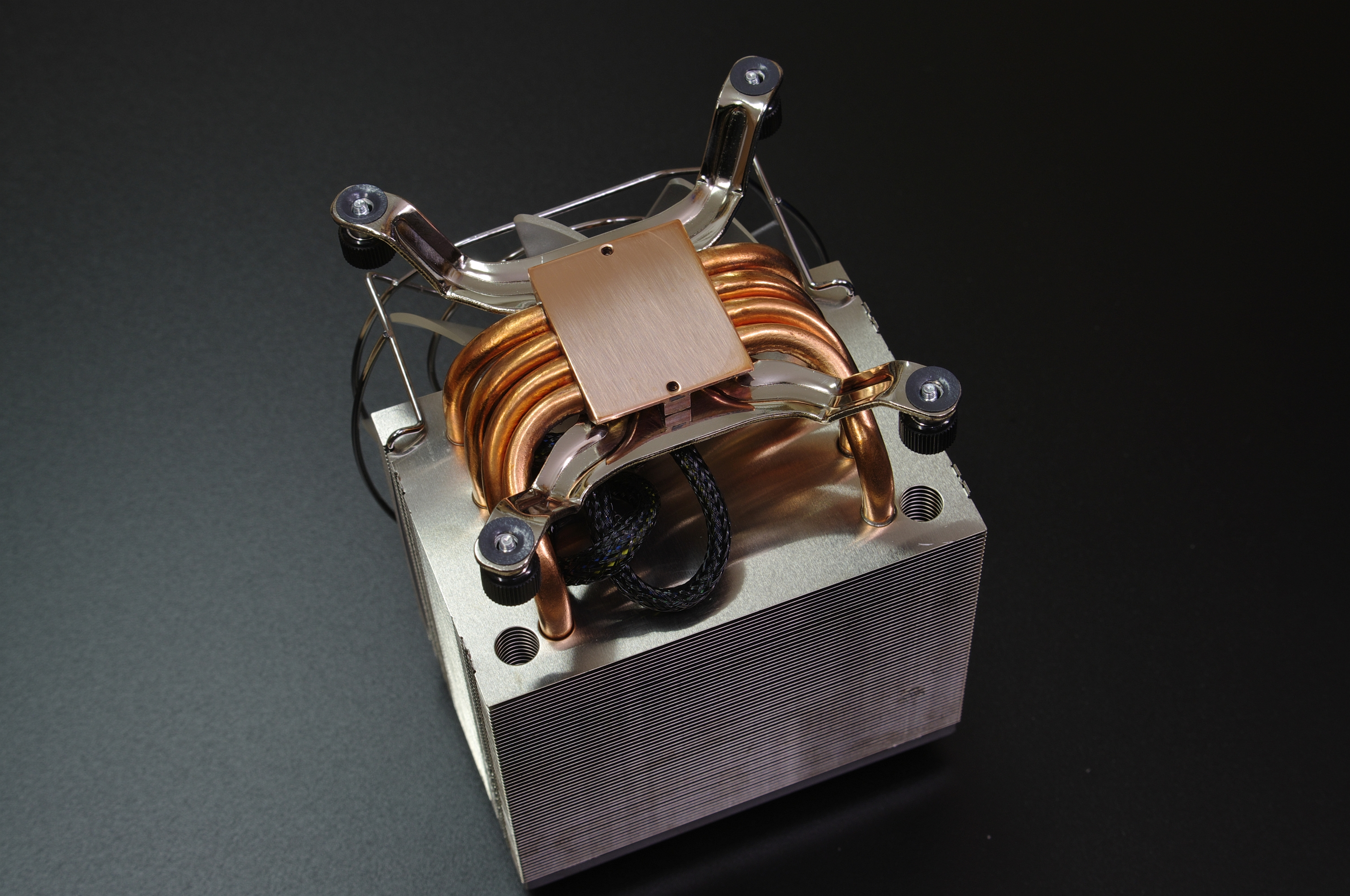 Intel-Kühler für Socket 1366, Unterseite